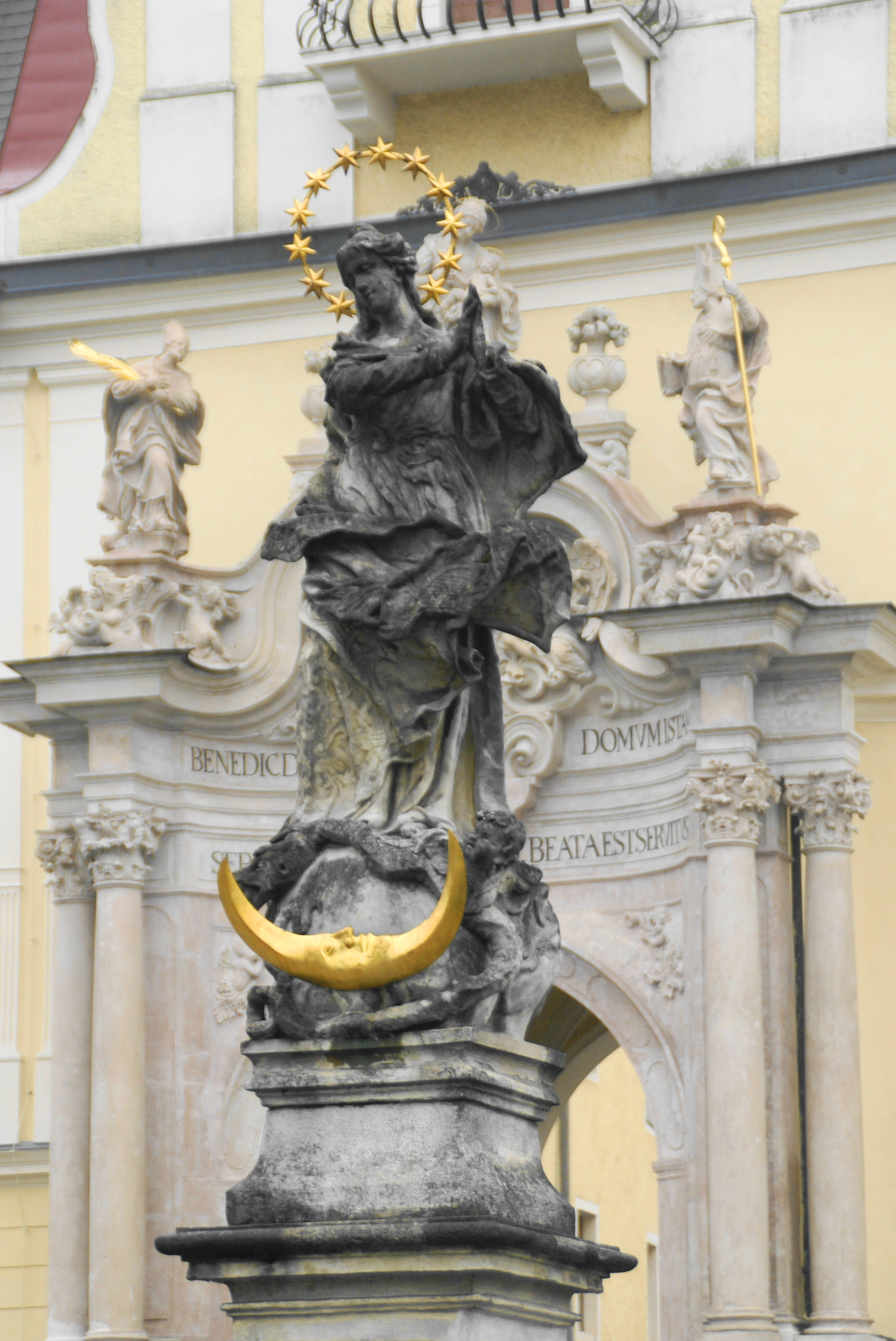 Stift Lambach - Marienstatue vor dem Hauptportal